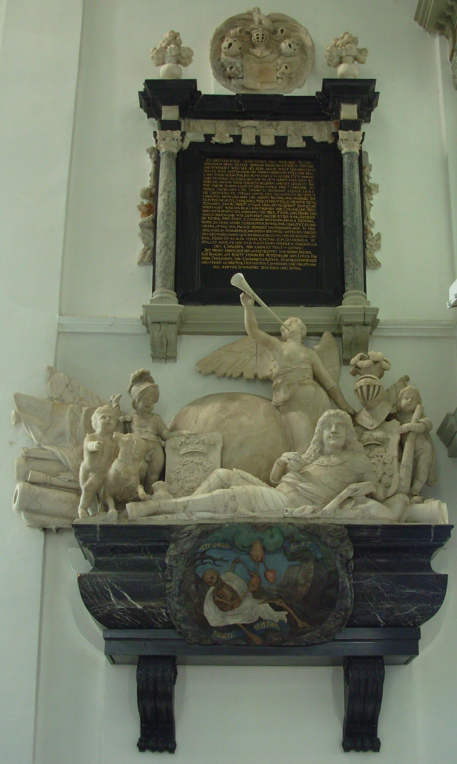 Epitaph des Detlev von Rumohr in der Nikolaikirche Kappeln